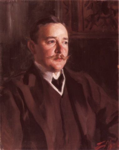 Erik Axel Karlfeldtlabel QS:Lcs,"Obraz Karfledta"label QS:Len,"Erik Axel Karlfeldt"